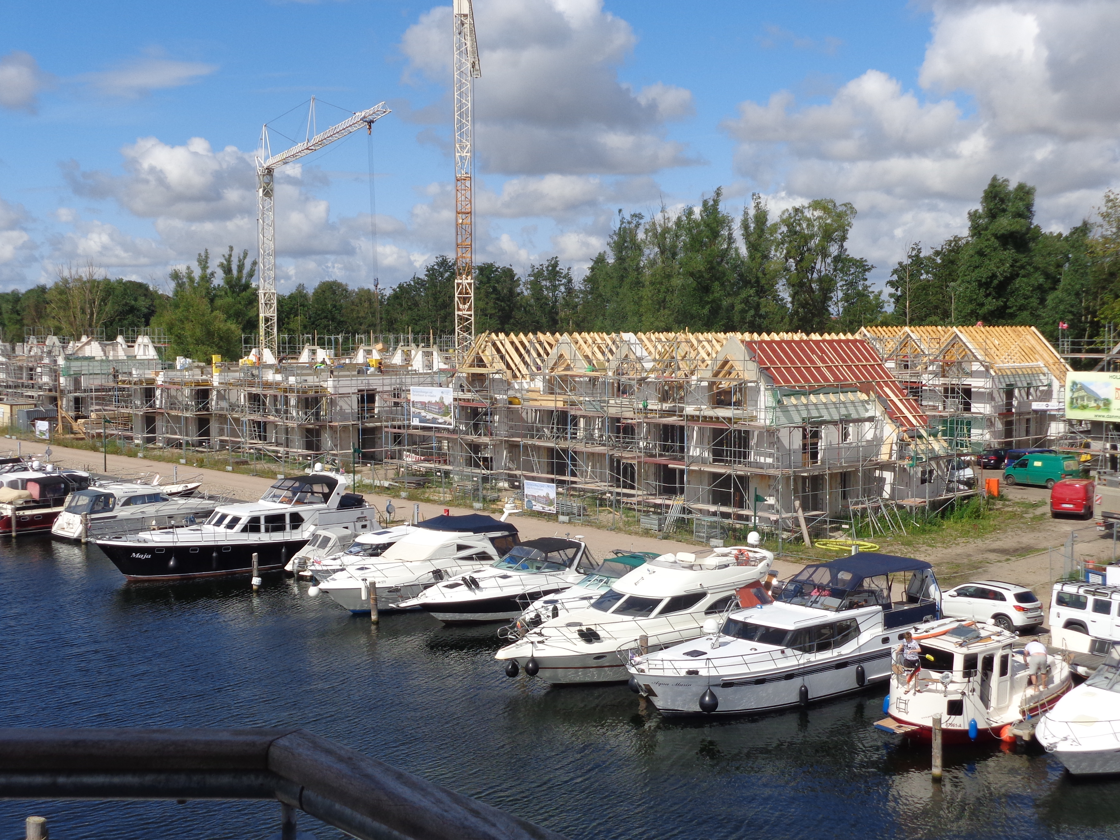 Marina an der Metow in Plau am See